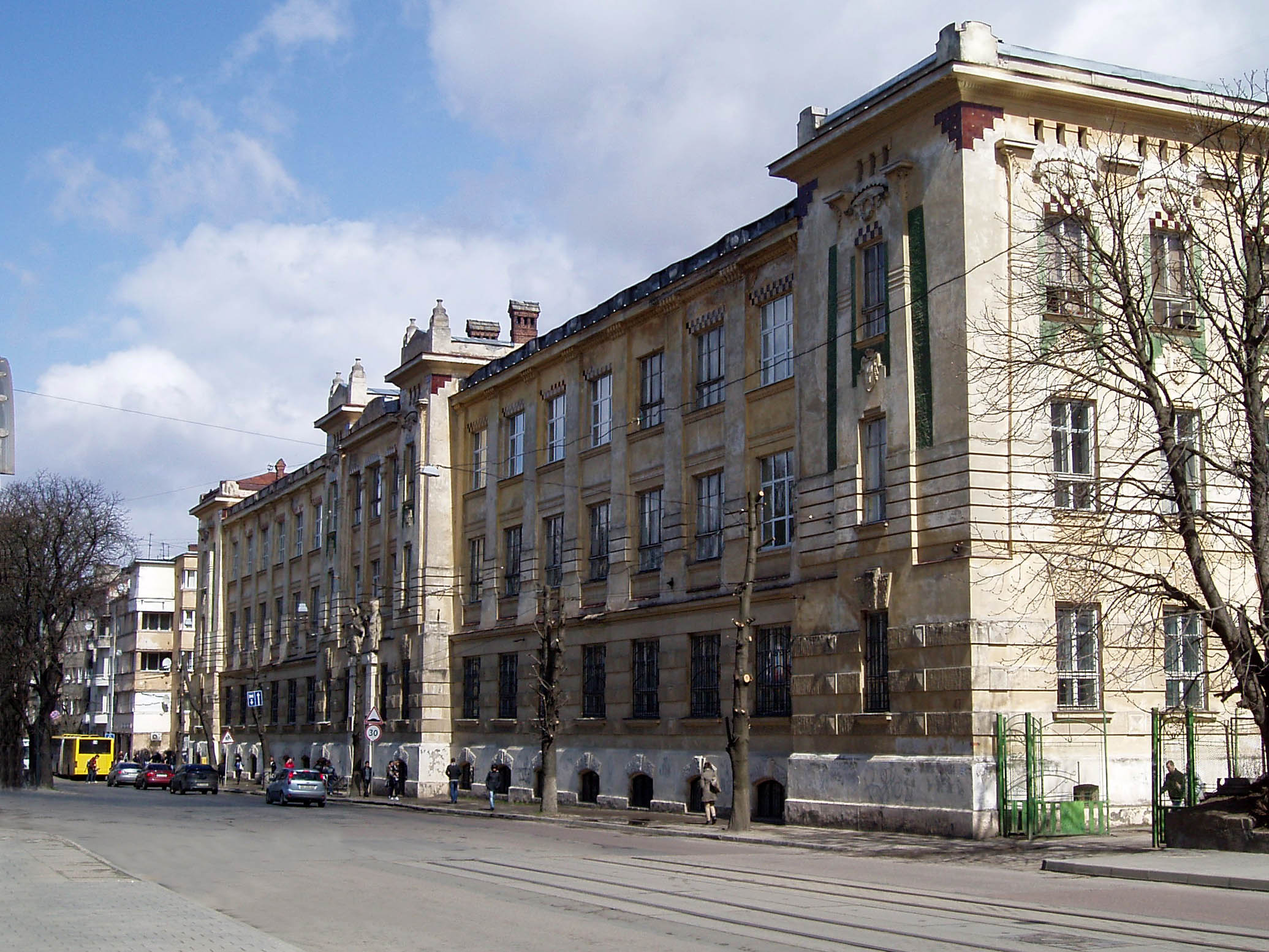 Будівля Художьно-промислової школи на вулиці Снопківській, 47 у Львові. Нині Львівський державний коледж декоративного та ужиткового мистецтва імені Івана Труша.